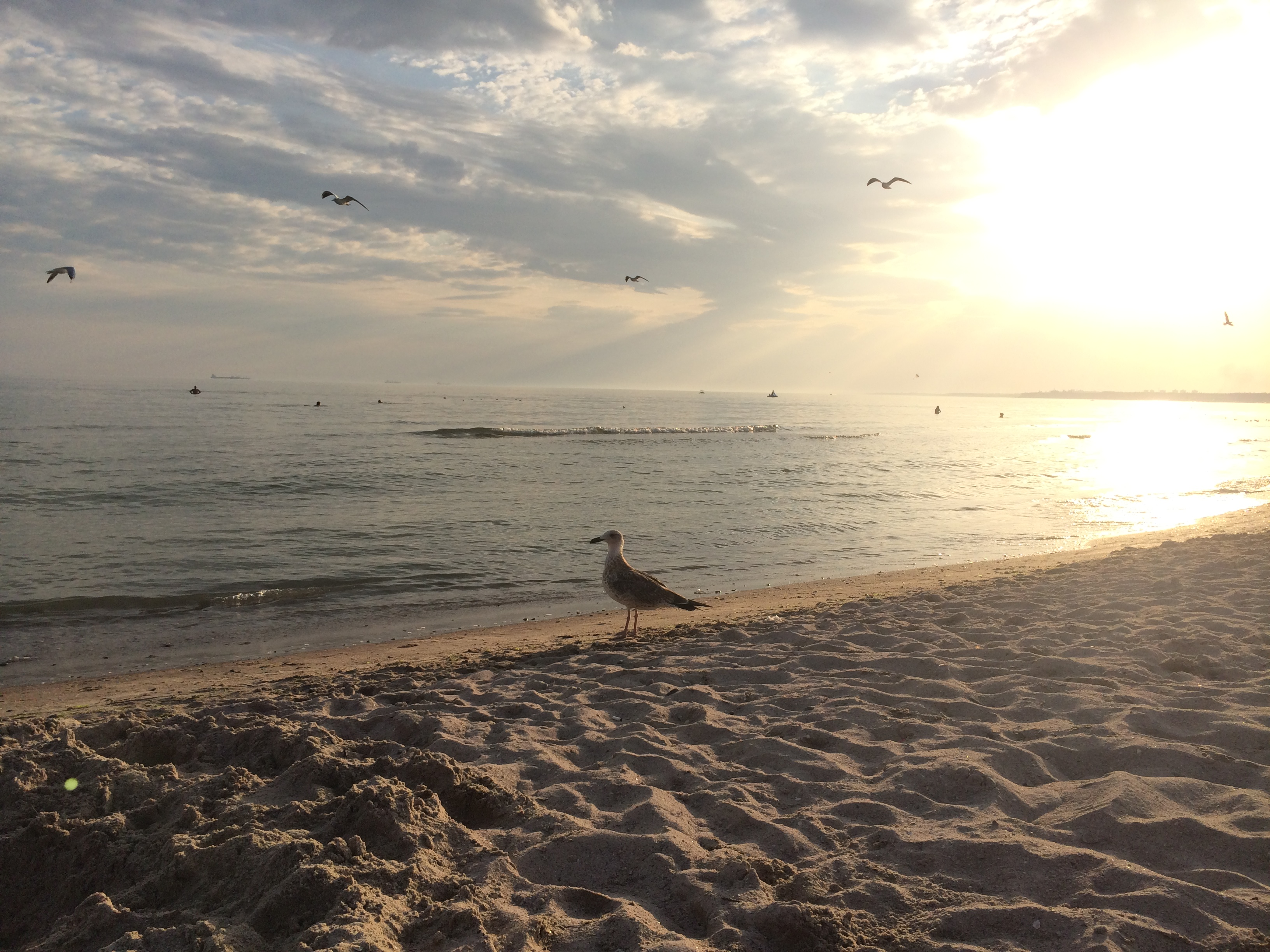 Тилігульський, Березанський р-н, с. Коблеве, пляж, чайка